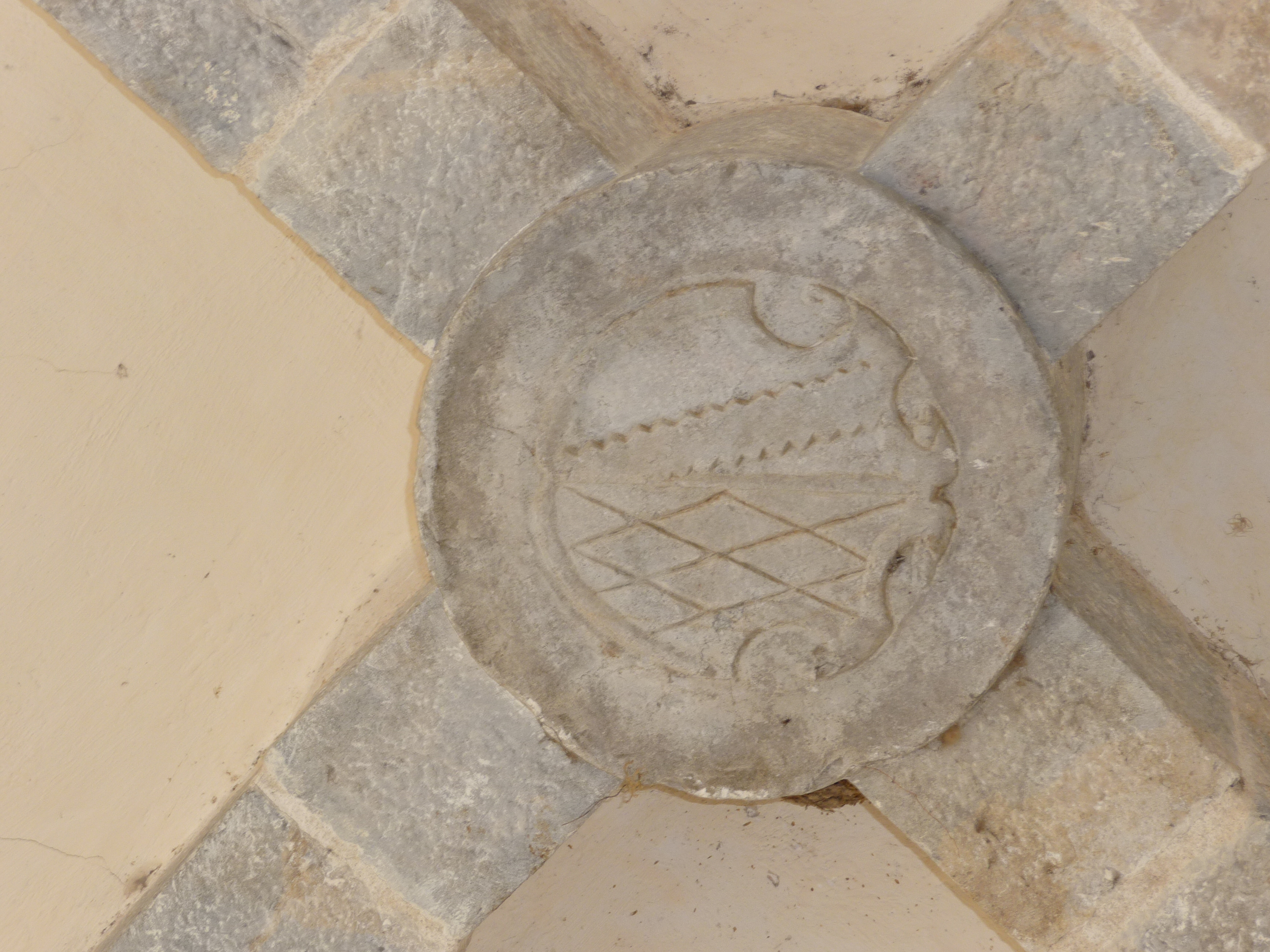 Clé de la voûte en croisée d'ogive du porche du XVIème de l'église de Boussières, aux armes de la famille d'Orchamps (curé de Boussières de l'époque)